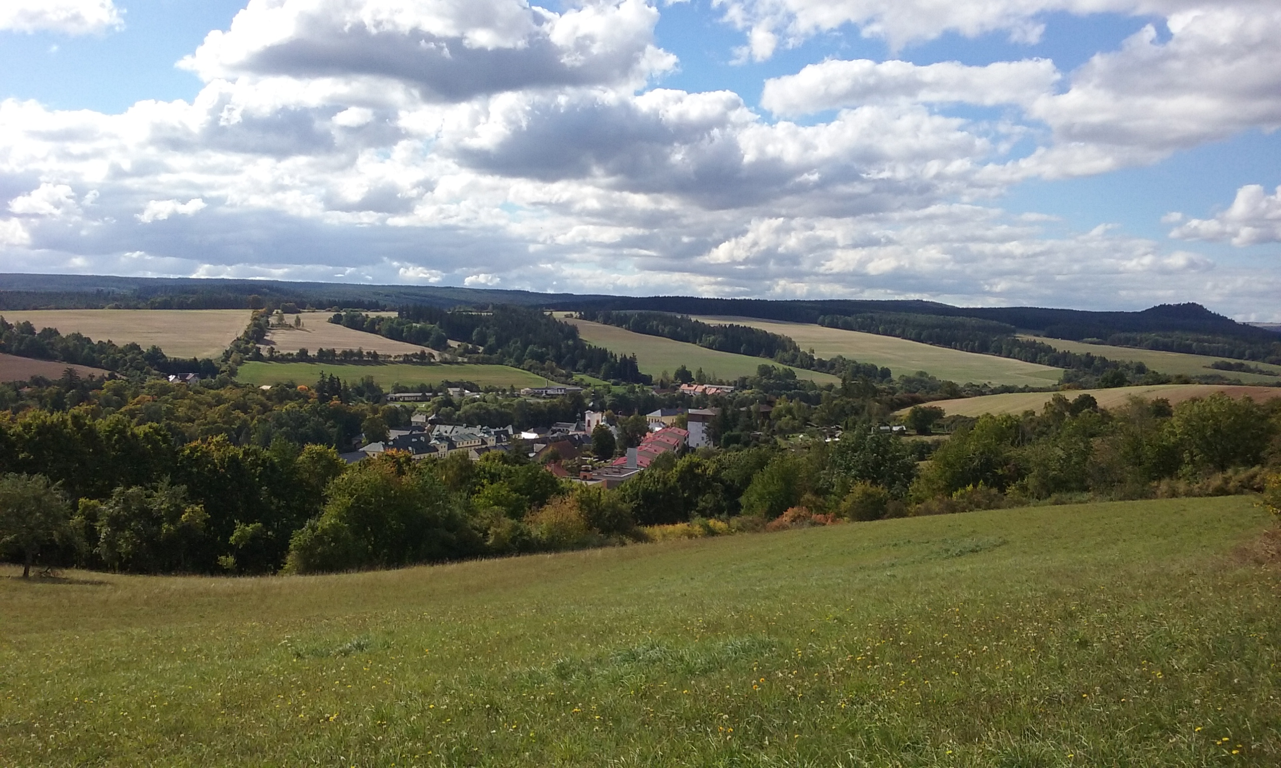 Manětín z dálky. Okres Plzeň-sever, Česká republika.